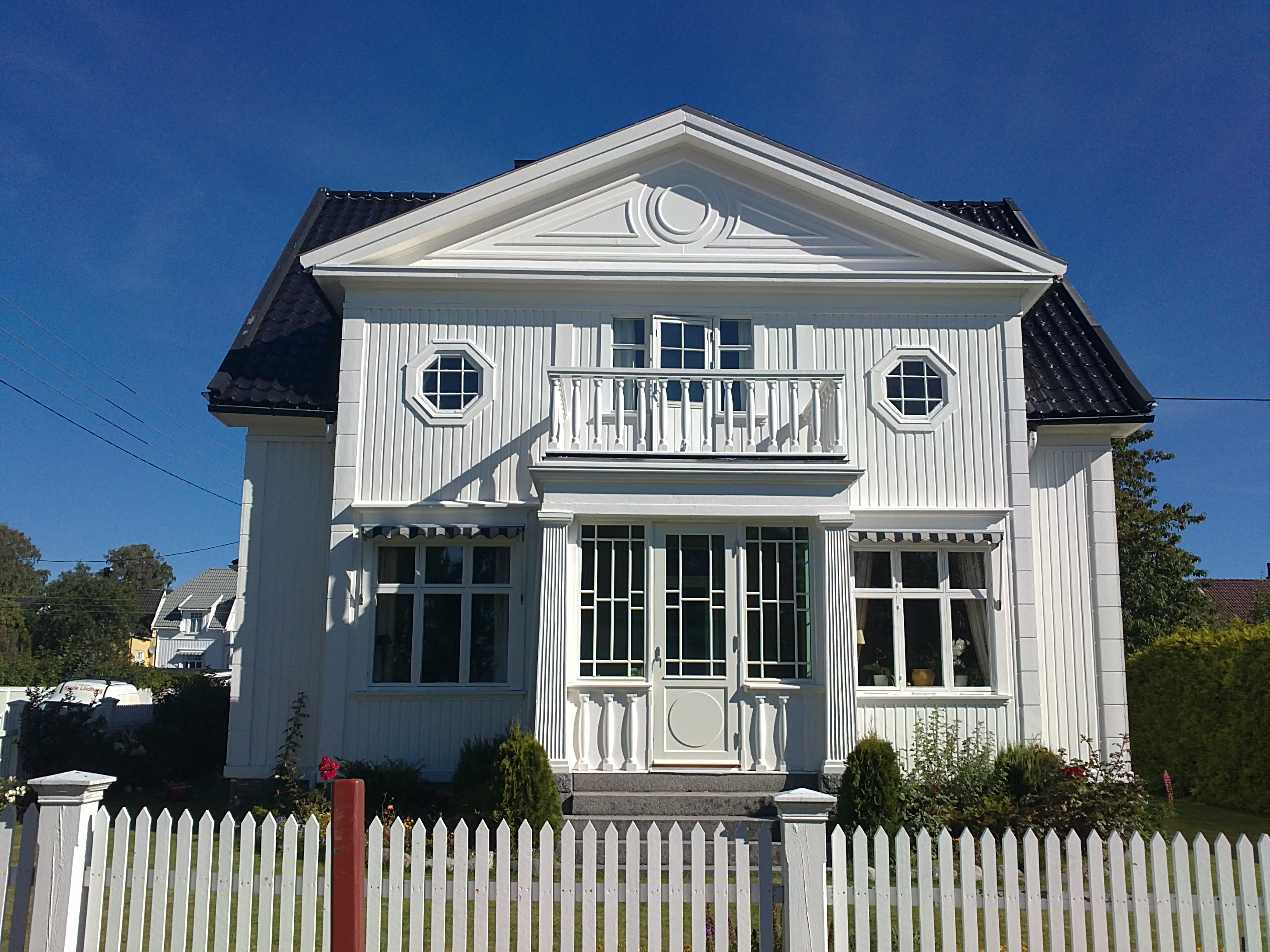 Bilde av huset "Elim", Amtmann Michelets vei 2, Nanset